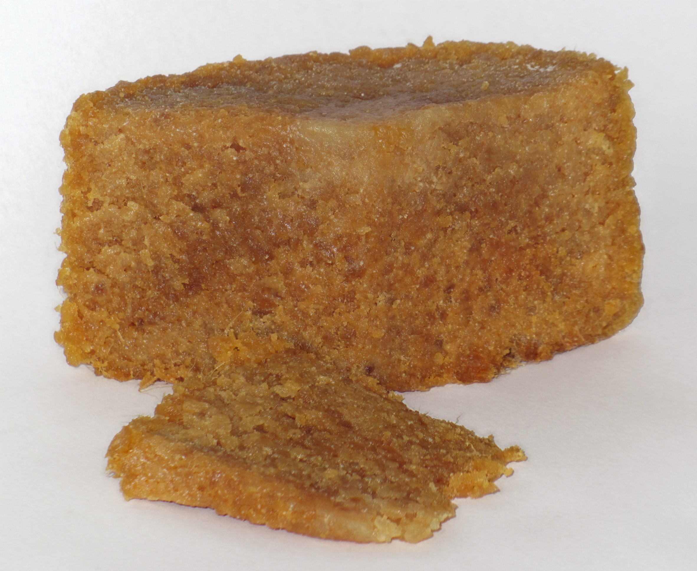 Tine Gamalost 2014